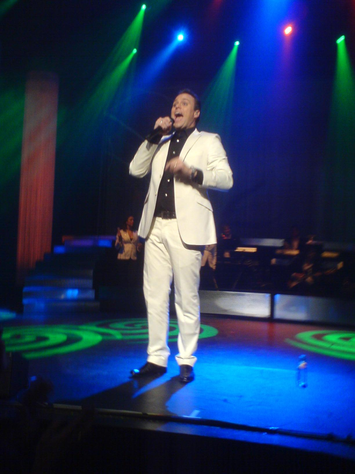 Dutch singer Frans Bauer.